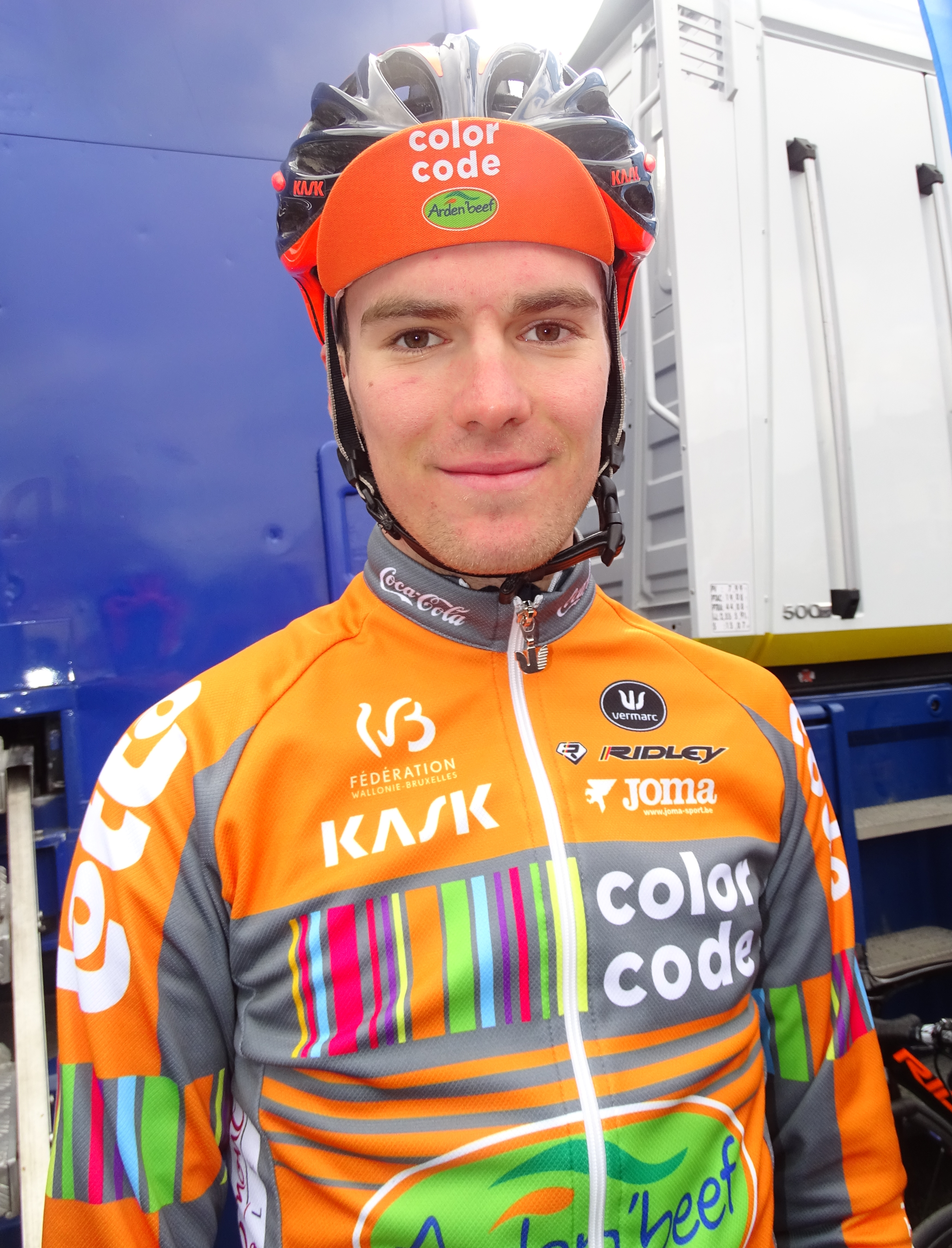 Reportage réalisé le dimanche 6 mars à l'occasion du départ et de l'arrivée du Grand Prix de Lillers-Souvenir Bruno Comini 2016 à Lillers, Pas-de-Calais, Nord-Pas-de-Calais, France.